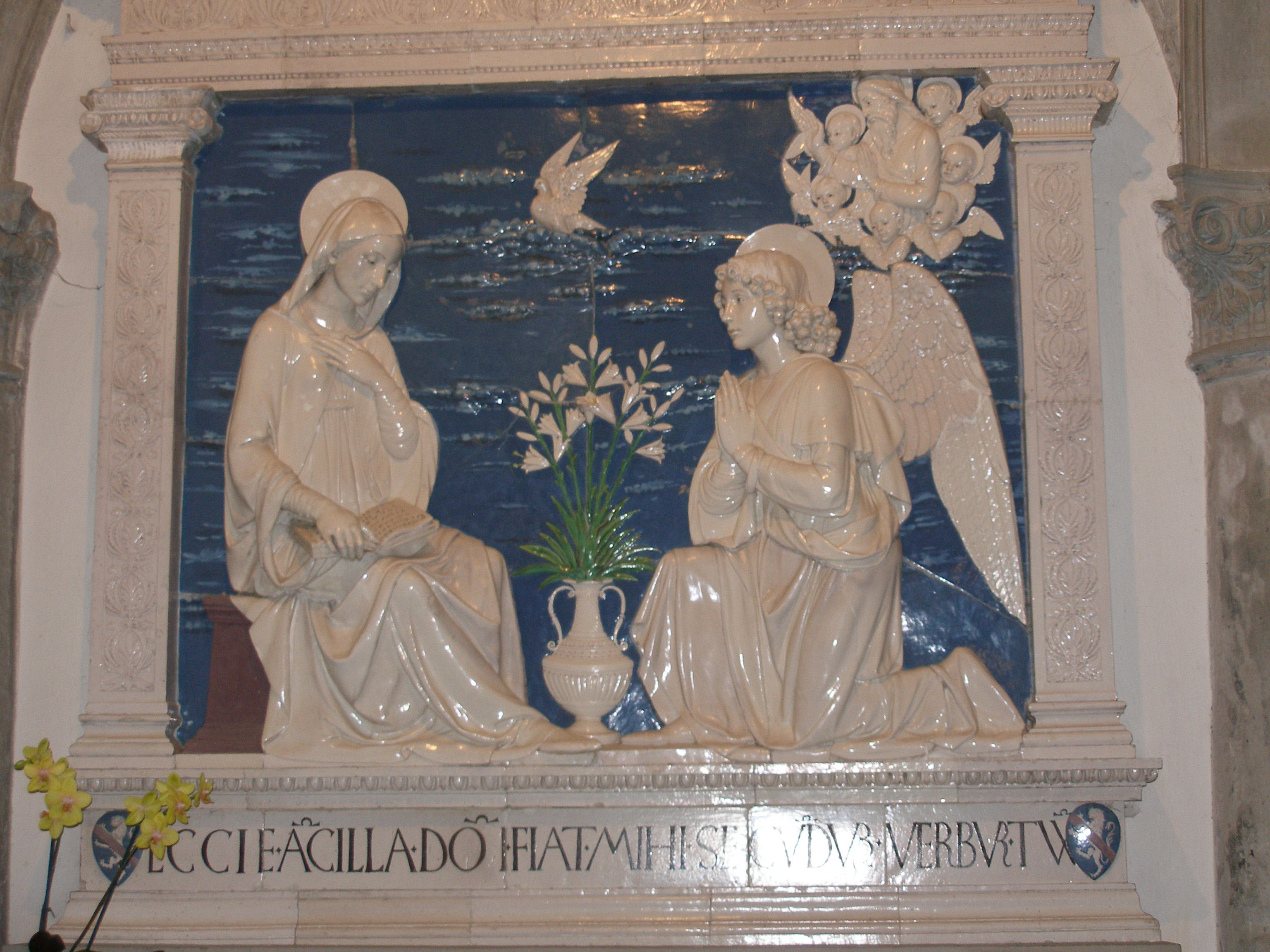 Andrea della Robbia, Annunciazione. Terracotta smaltata nel Santuario della Verna, a Chiusi.